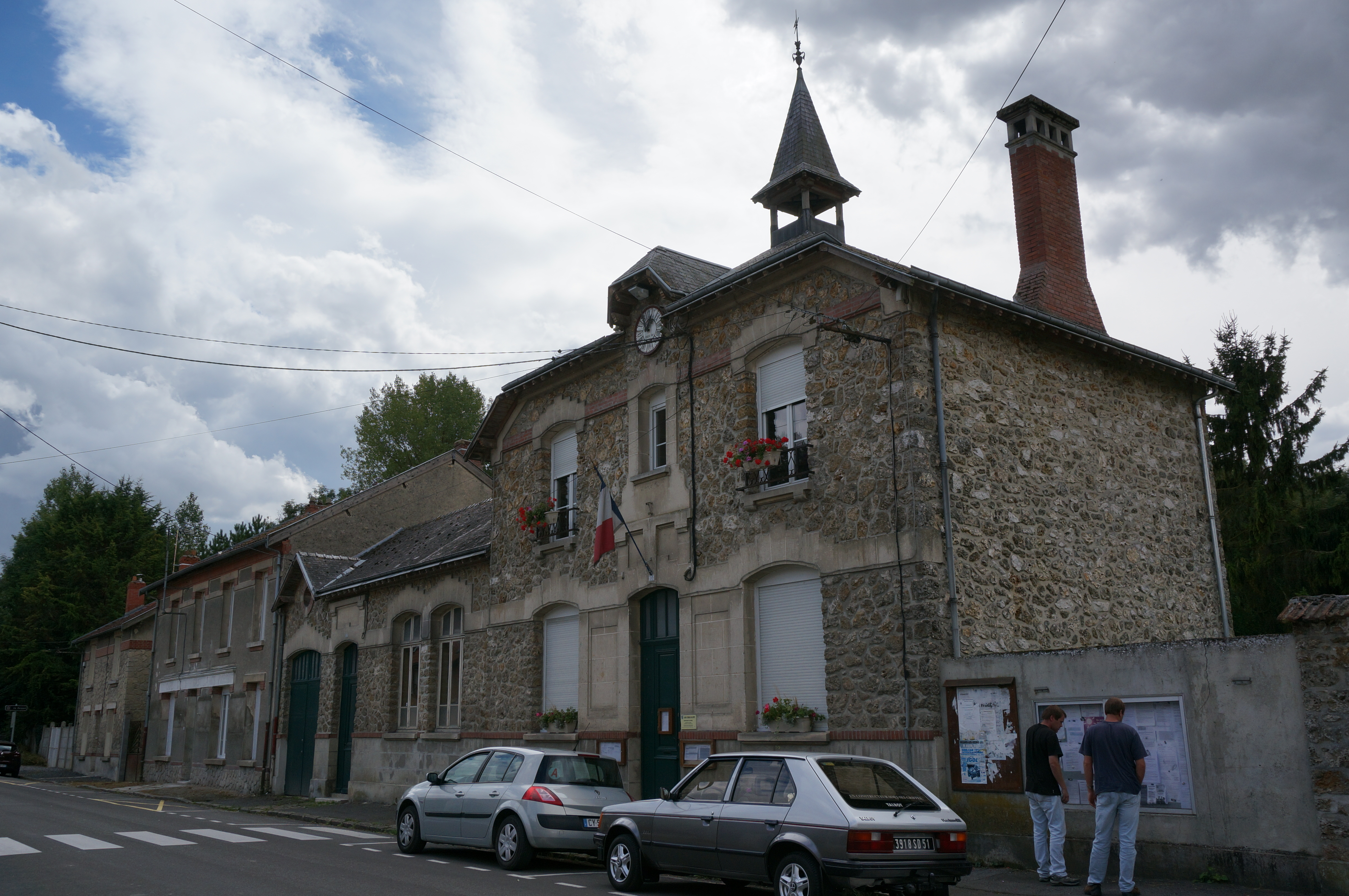 La maison communale .